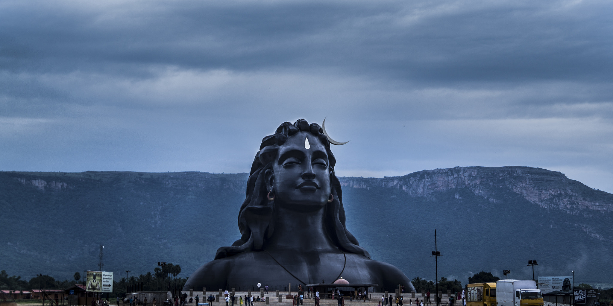 500px provided description: Adi Yogi Shiva statue in Coimbatore, India [#statue ,#india ,#god ,#shiva ,#incredibleindia ,#adiyogi]